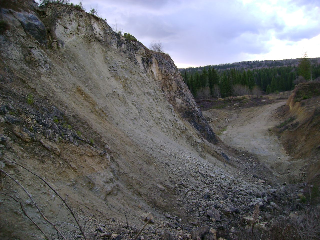 Малая гора в Дубовое